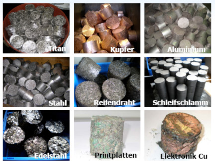 Verschiedene Briketts gamacht aus verschiedenen Materialien